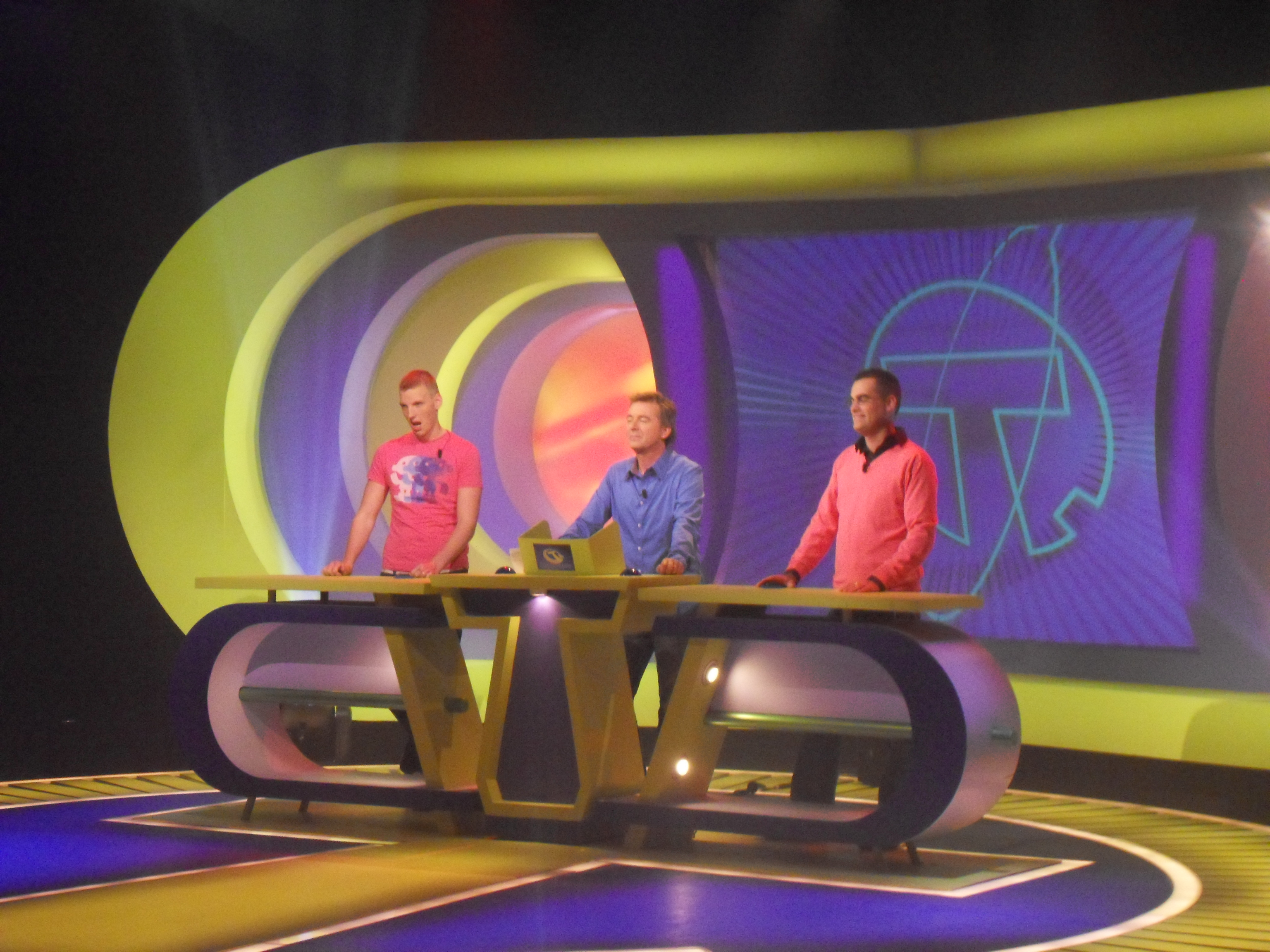 Set van That's the question, vlak voor de opname van de uitzending van 7 december 2009.